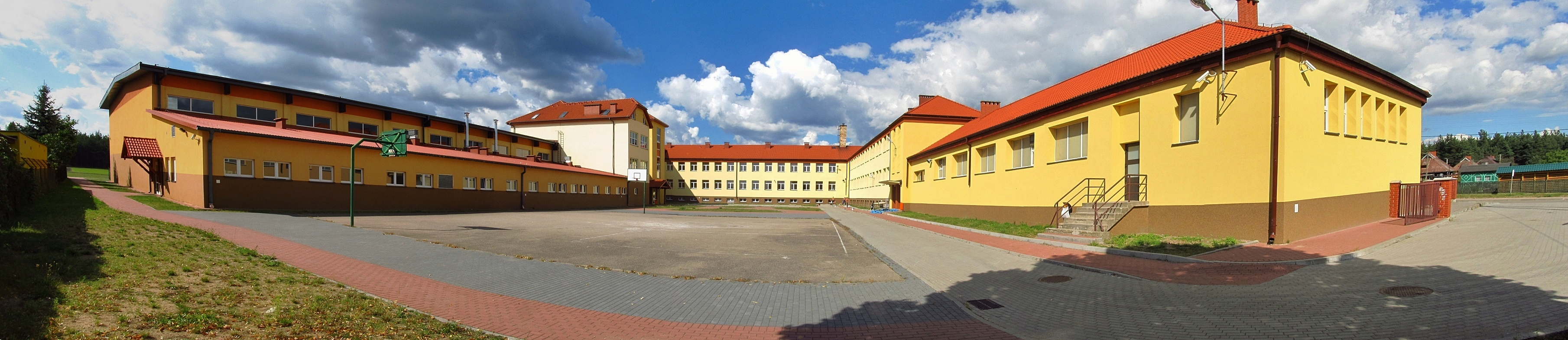 Całkowicie zmodernizowany obiekt ZSP w Kaliskach. Obiekt na miarę XXI wieku.